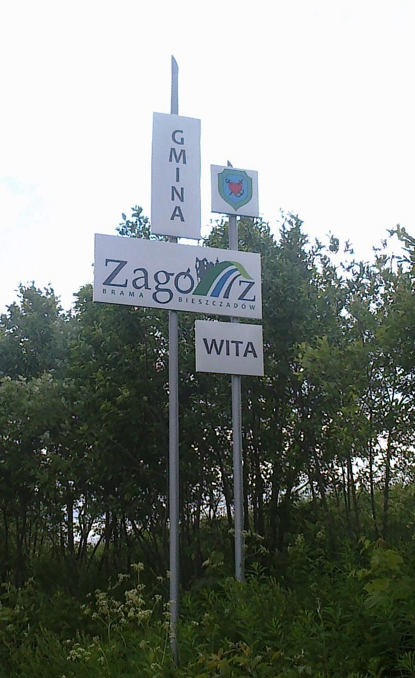 Przydrożna tablica z logo i herbem Gminy Zagórz